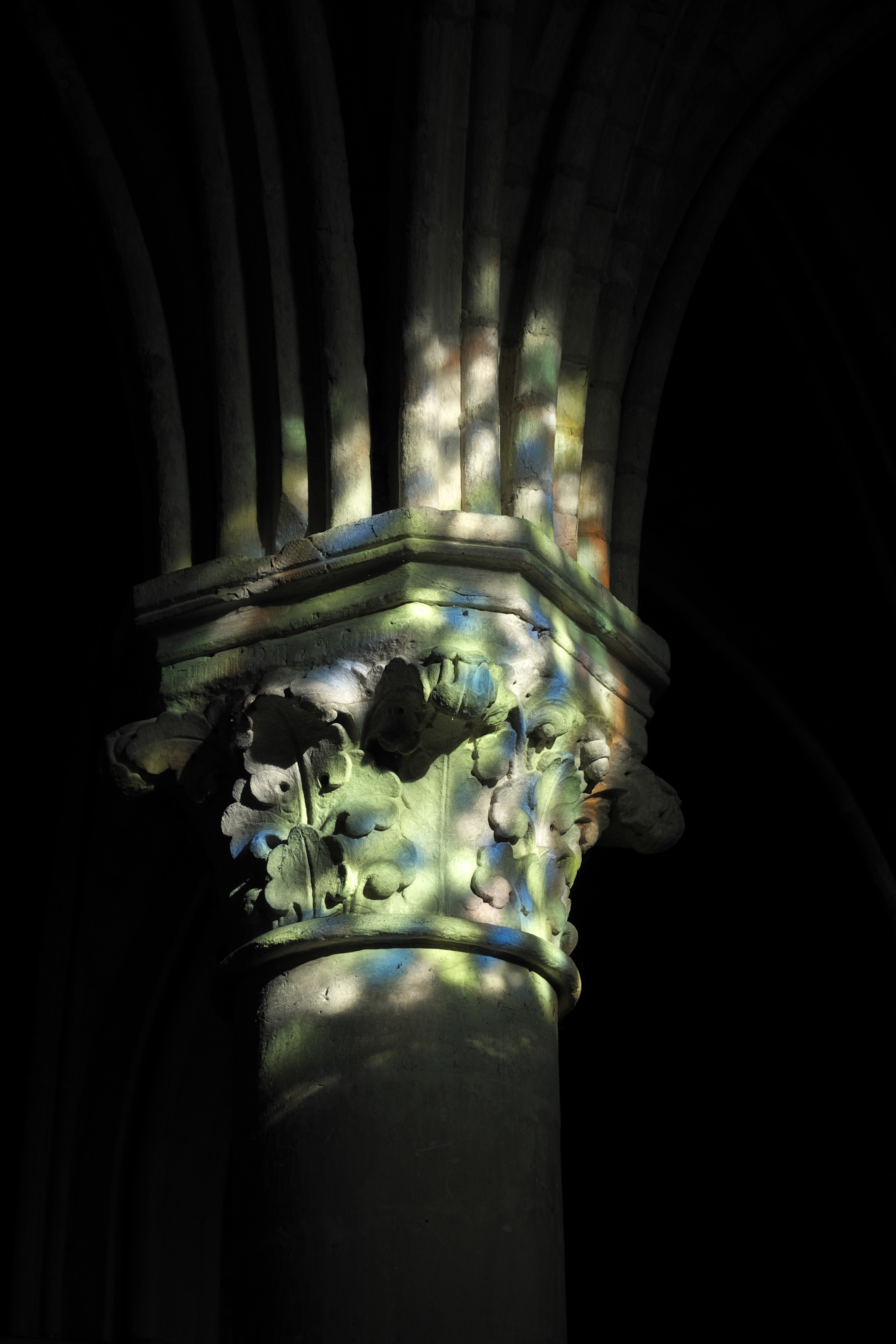 Katholische Pfarrkirche Saint-Laurent in Beaumont-sur-Oise im Département Val d'Oise (Île-de-France/Frankreich), Kapitell des südlichen Seitenschiffs